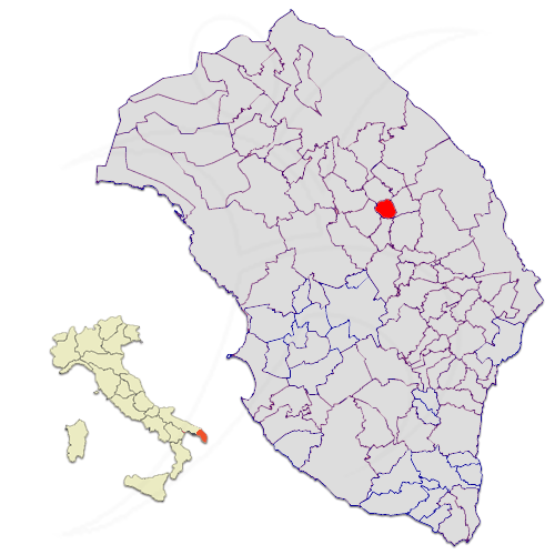 Il territorio del comune di Martignano nella provincia di Lecce